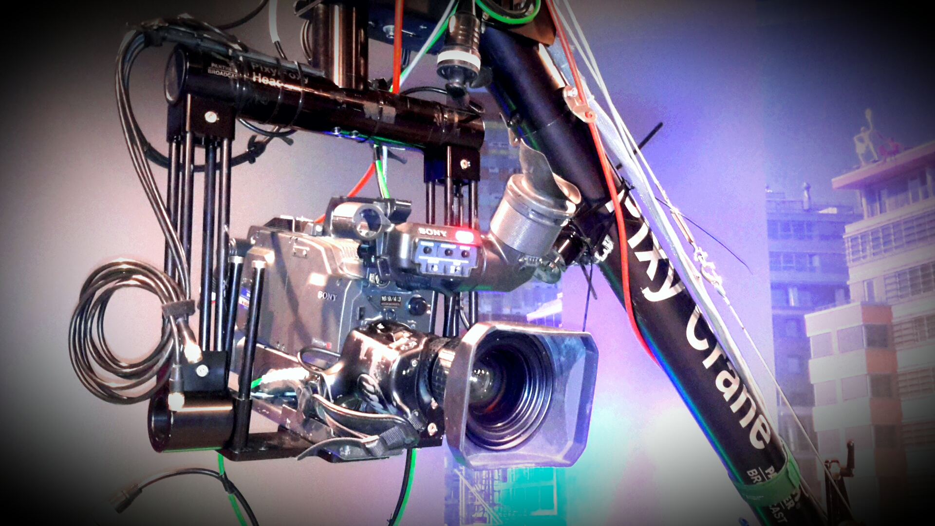 Studiokran im Studio von NRW.TV